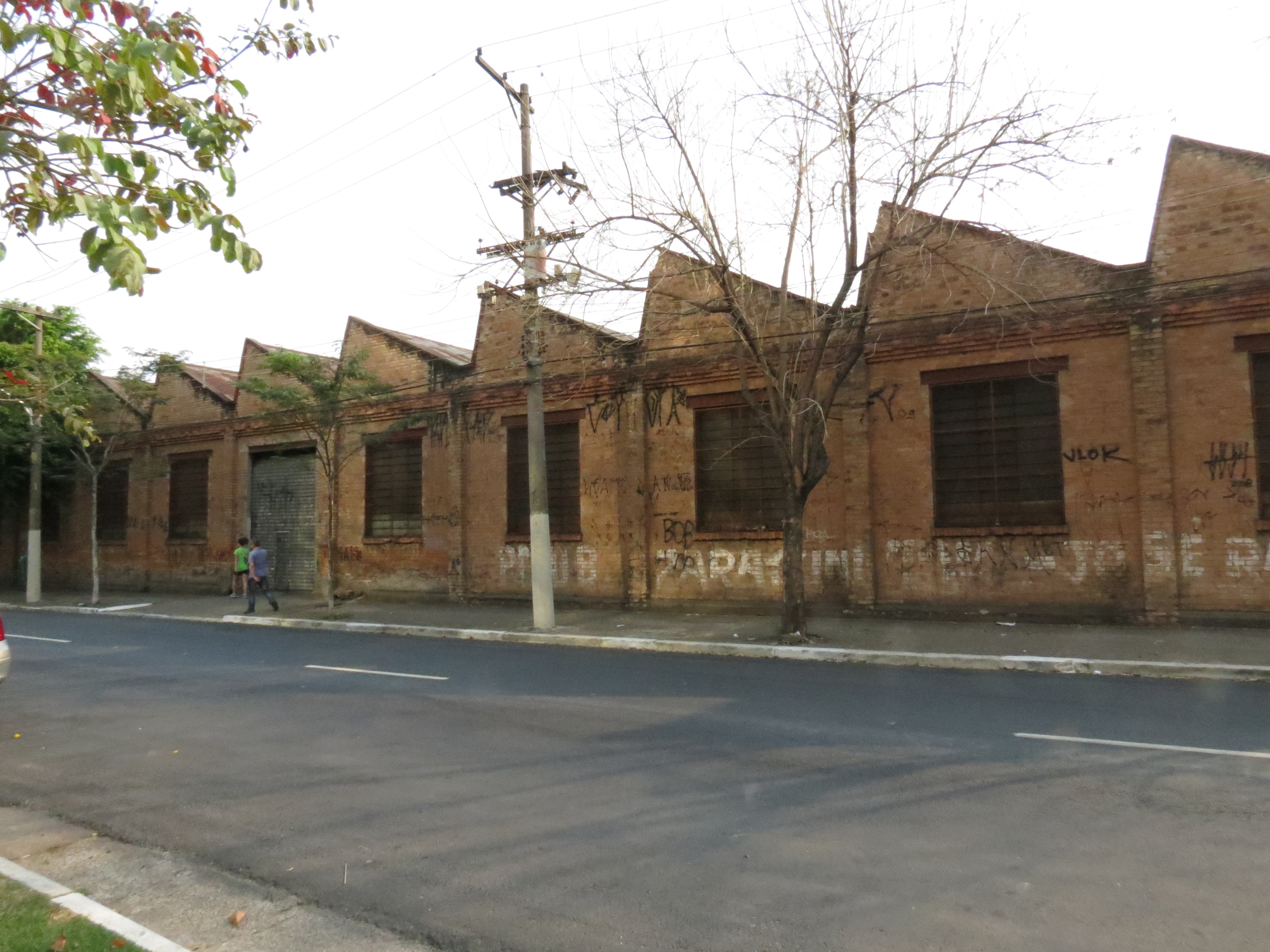 Lateral das officinas Casa Vanorden, na rua Borges de Figueiredo